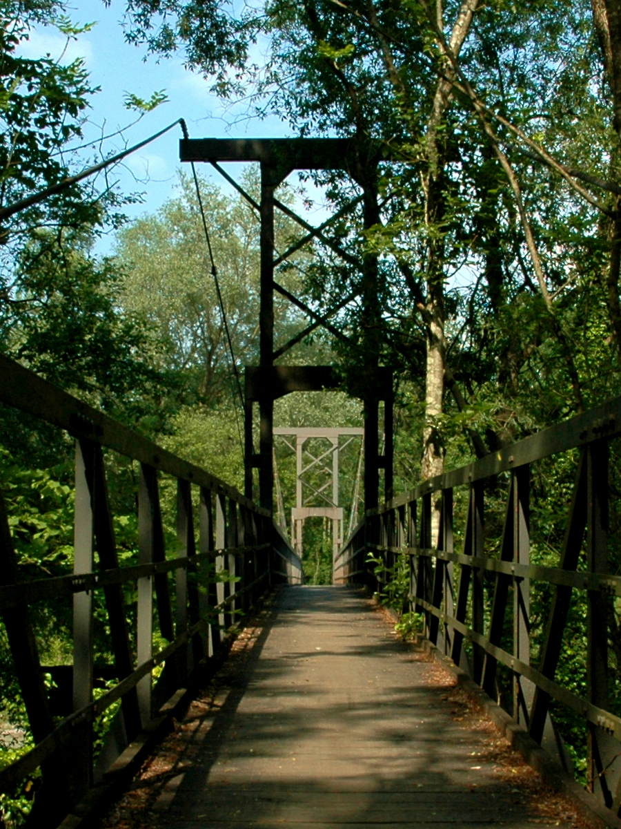 Illspitz, romantische, alte Hängebrücke über die Ill (bis 2008)